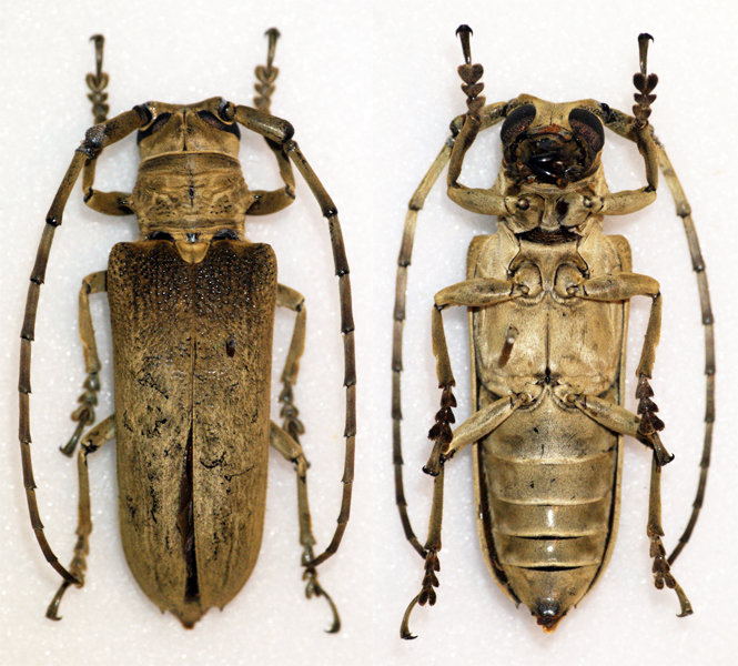 Newman,1842 Sex: Male Data: 02-2013 - Samar - Philippines